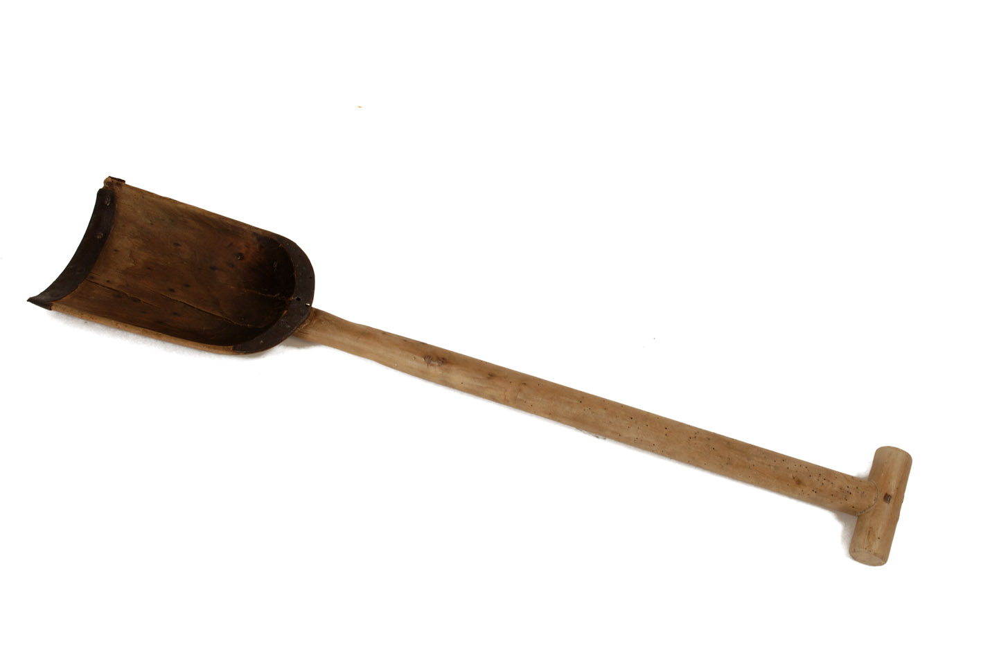 Fotografies dels objectes de l'exposició permanent de la sala "Secà i Muntanya" del Museu Valencià d'Etnologia - Fotografies de Mateo Gamon. Pala per a netejar sèquies.